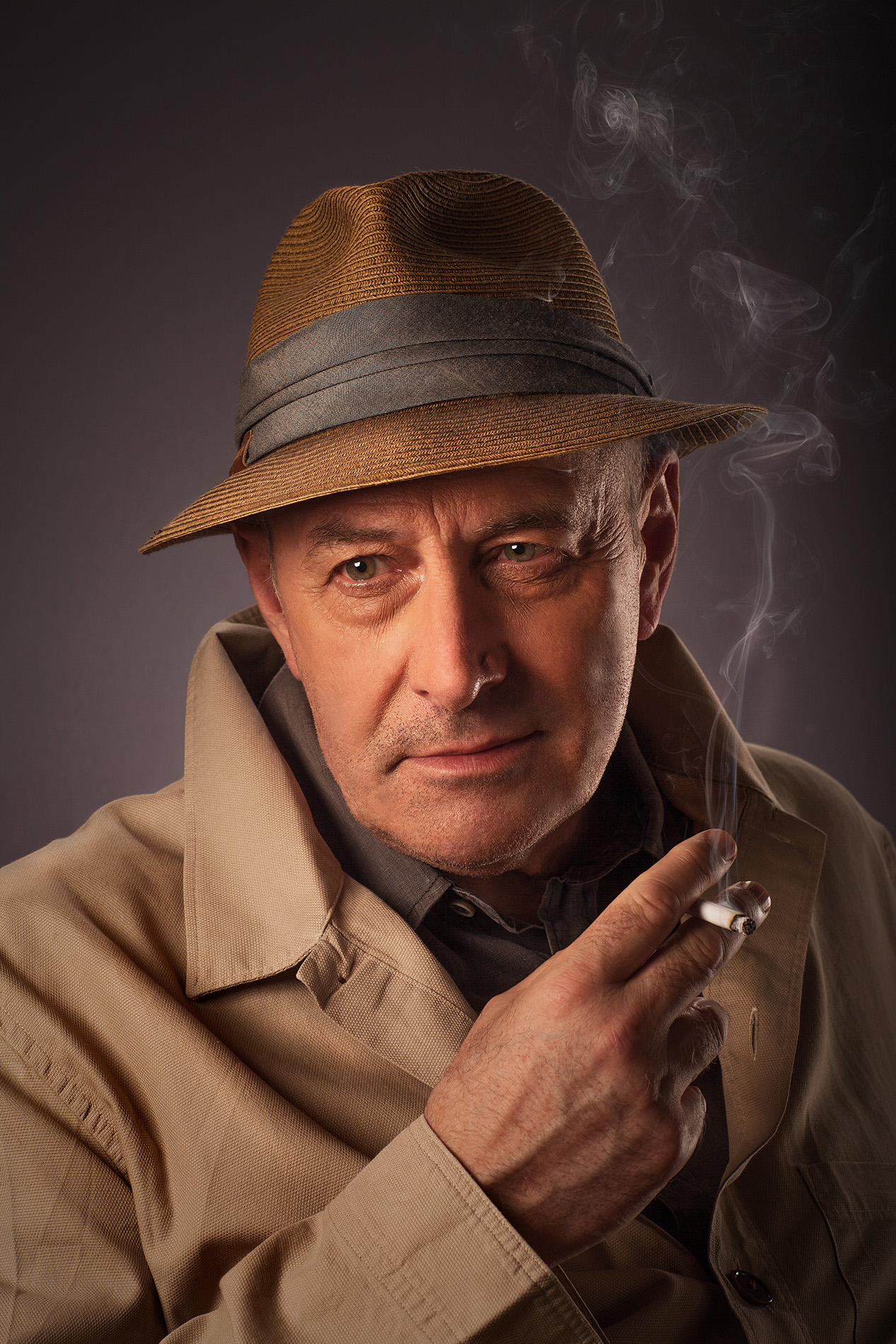 Siniša Popović